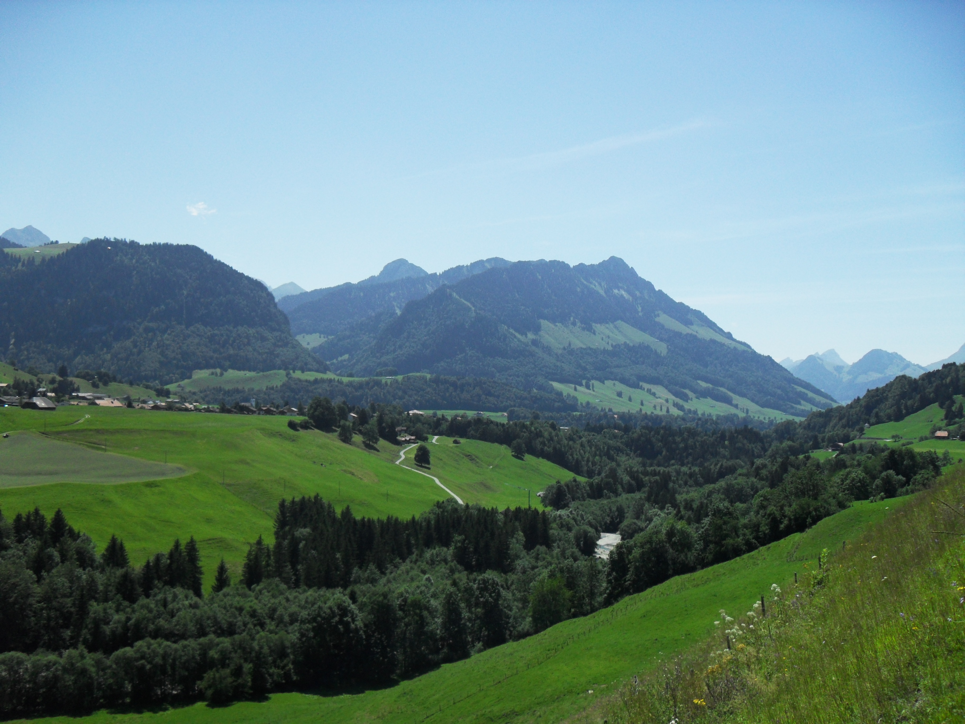 Vu sur la vallée du Javro du côte de Cerniat, près du sorti du village.